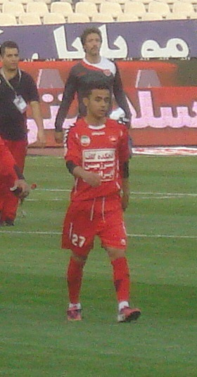 Rouhollah Seifollahi, Persepolis-Malavan match, 2012-13 Iran Pro League